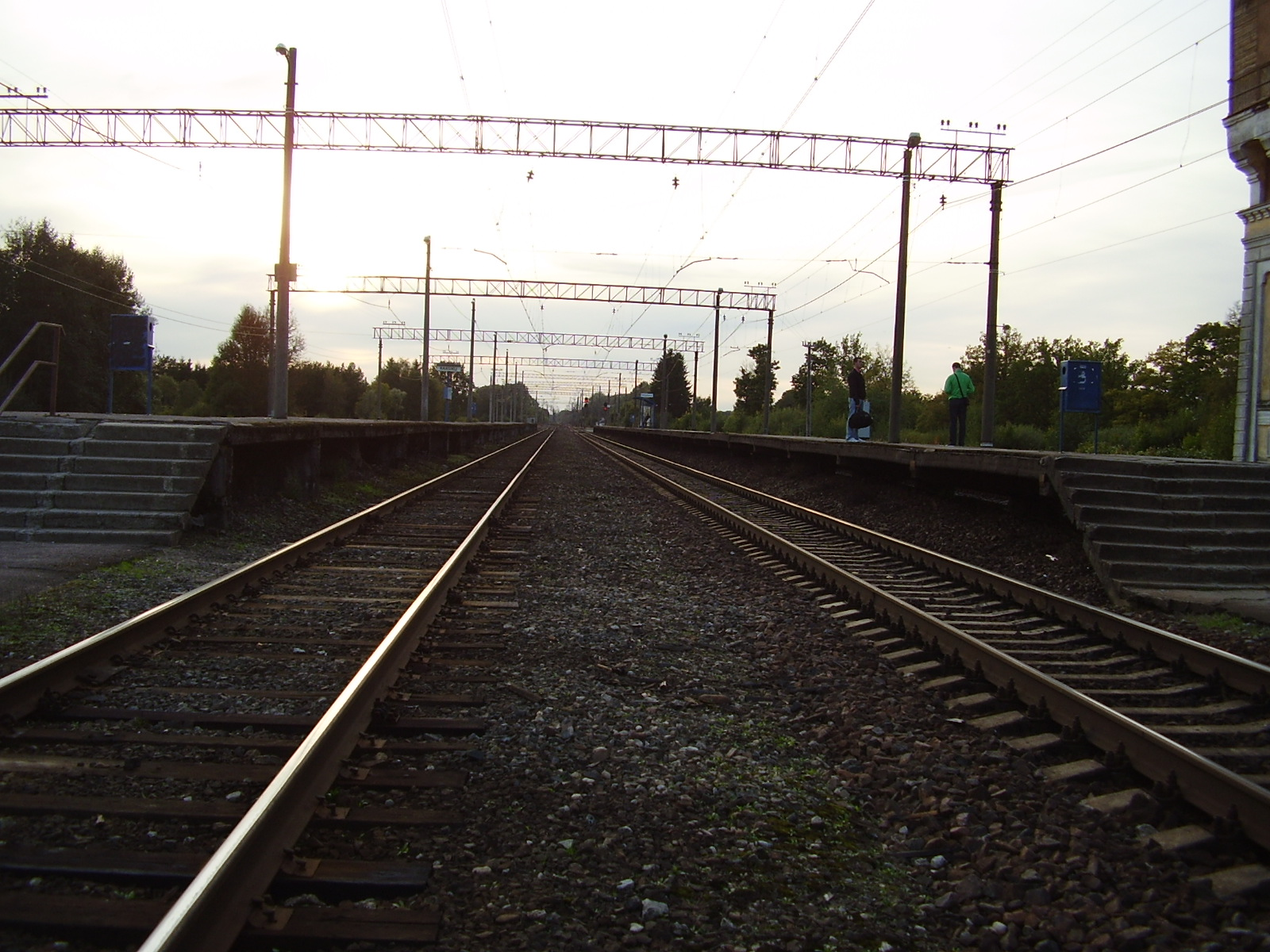 Pilt Raasiku raudteejaamast